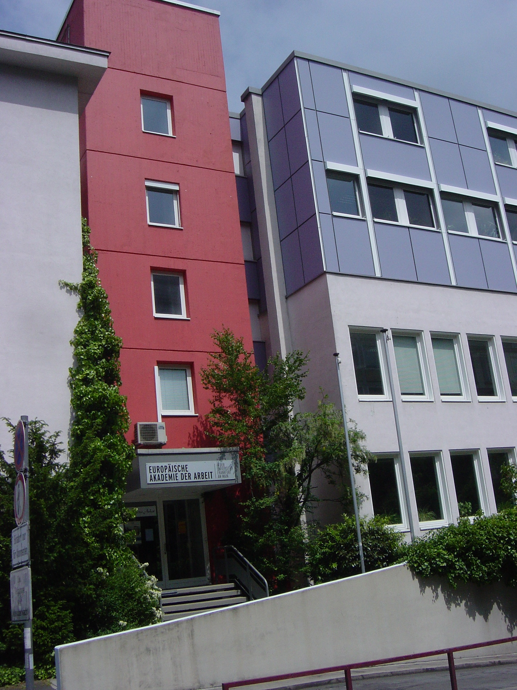 Frankfurt Bockenheim Campus Bockenheim, EAdA Europäische Akademie der Arbeit